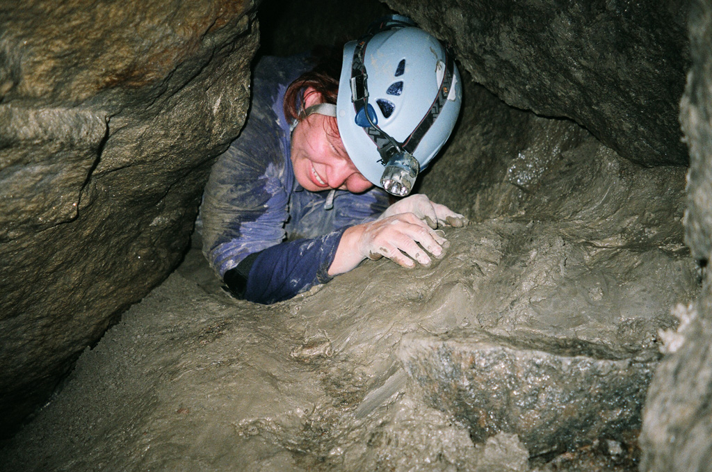 Luolatutkija Bodagrottornassa, Ruotsissa.